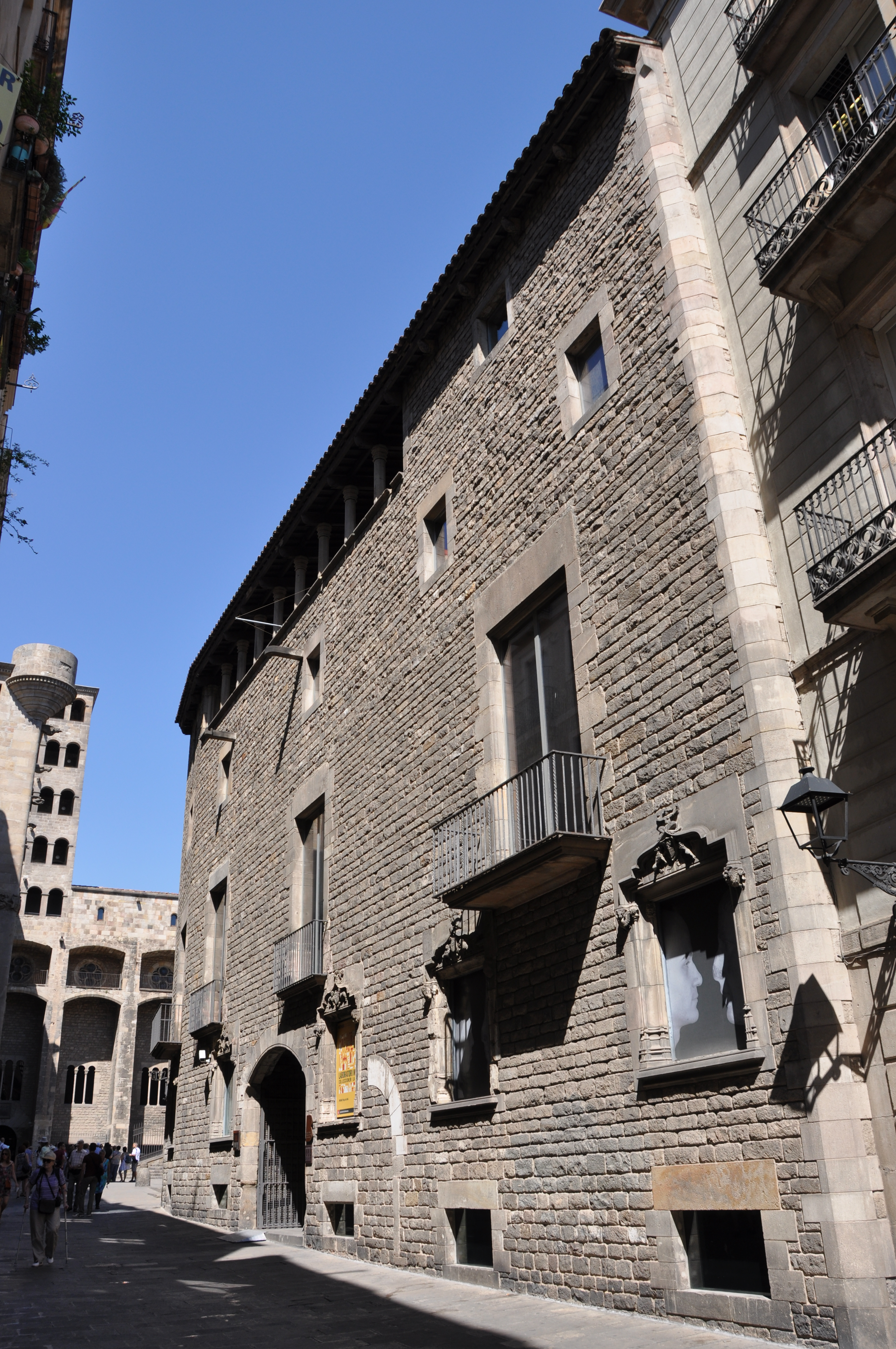 Exterior de la Casa Padellàs